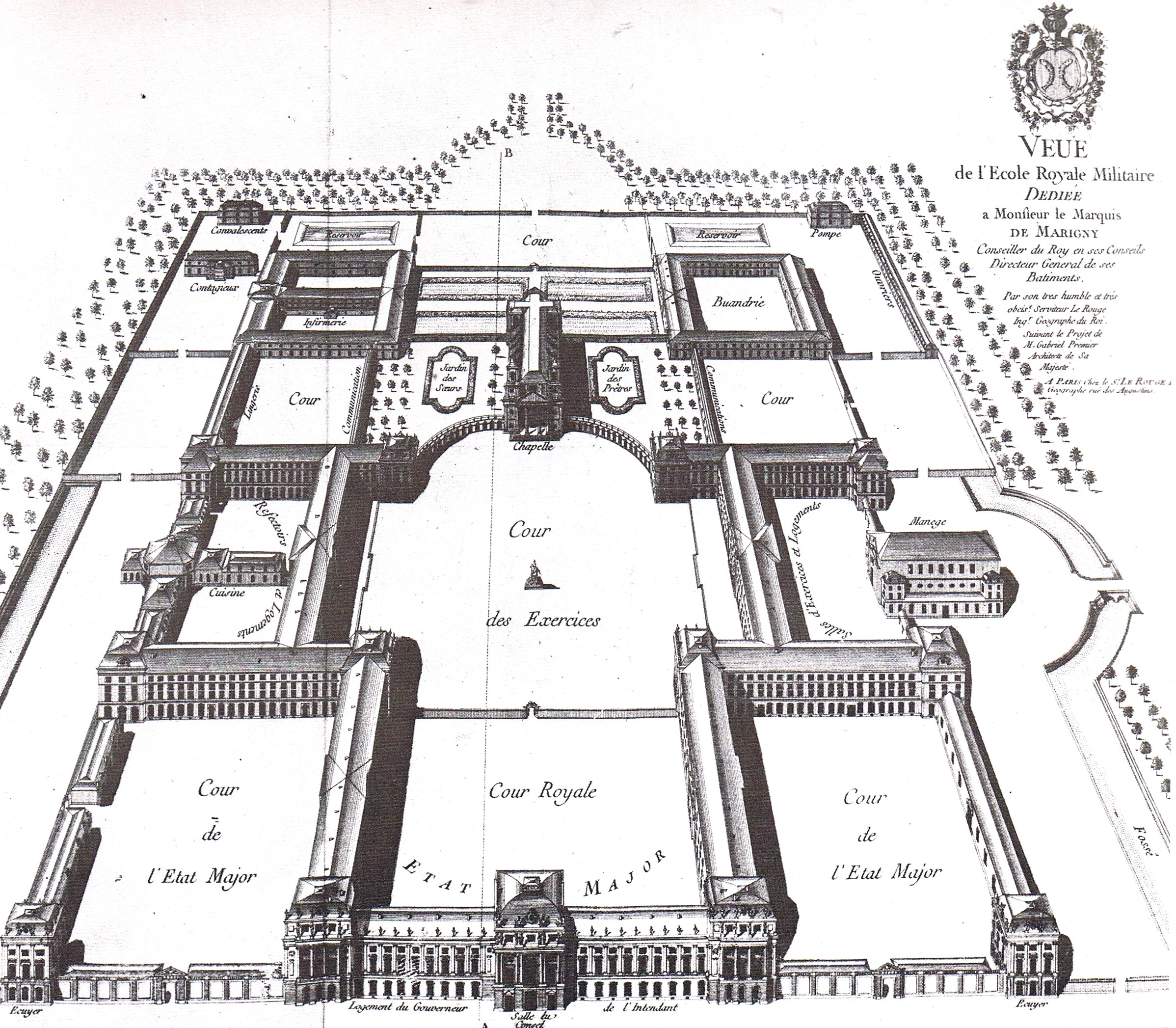 Le projet initial d'Ange-Jacques Gabriel pour l'Ecole militaire.